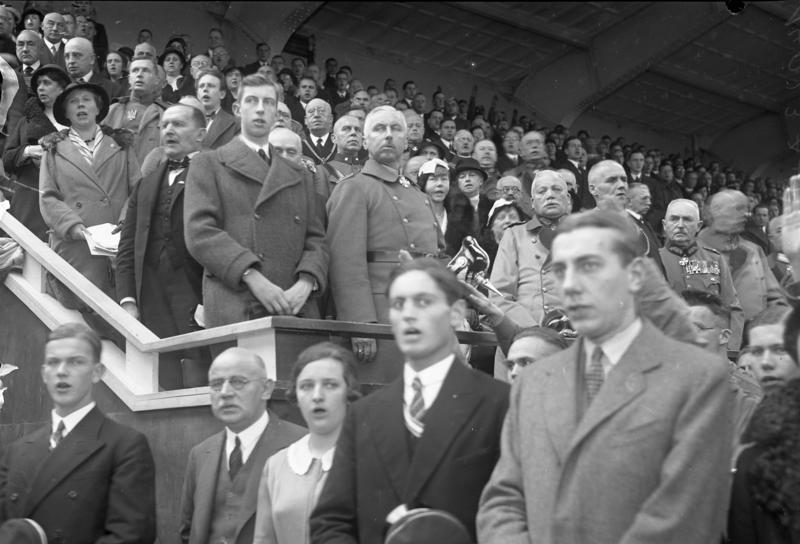 Die grosse Gedenkfeier für die Toten von Langemark fand unter Beteiligung der Studentischen Verbindungen in der Tennishalle am Fehrbelinerplatz [sic!] in Berlin statt. Prinz Oskar von Preussen und sein Sohn sowie Führer der alten Armee wohnten der erhebenden Feier bei.